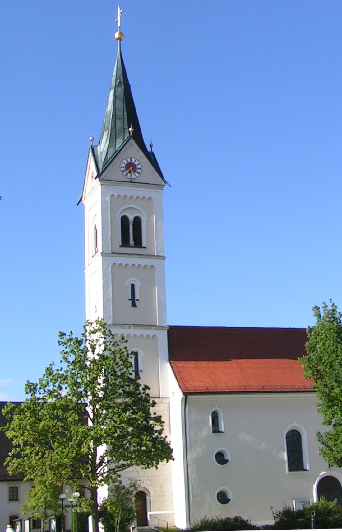 Pfarrkirche St. Sixtus, Münchsmünster, Landkreis Pfaffenhofen, Oberbayern. Der Kirchturm wurde im Jahre 1889 unter dem Baumeister Magnus Wieser, Kelheim, in einer Höhe von 48 m neu errichtet, nachdem der alte Turm wegen Baufälligkeit abgerissen werden musste..